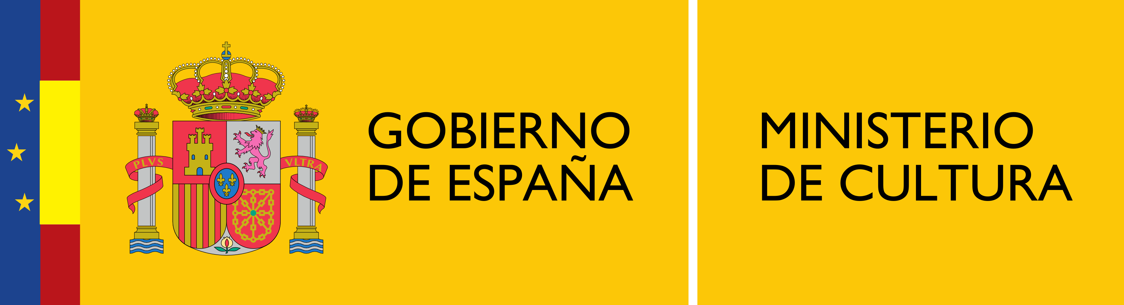 Logotipo del Ministerio de Cultura